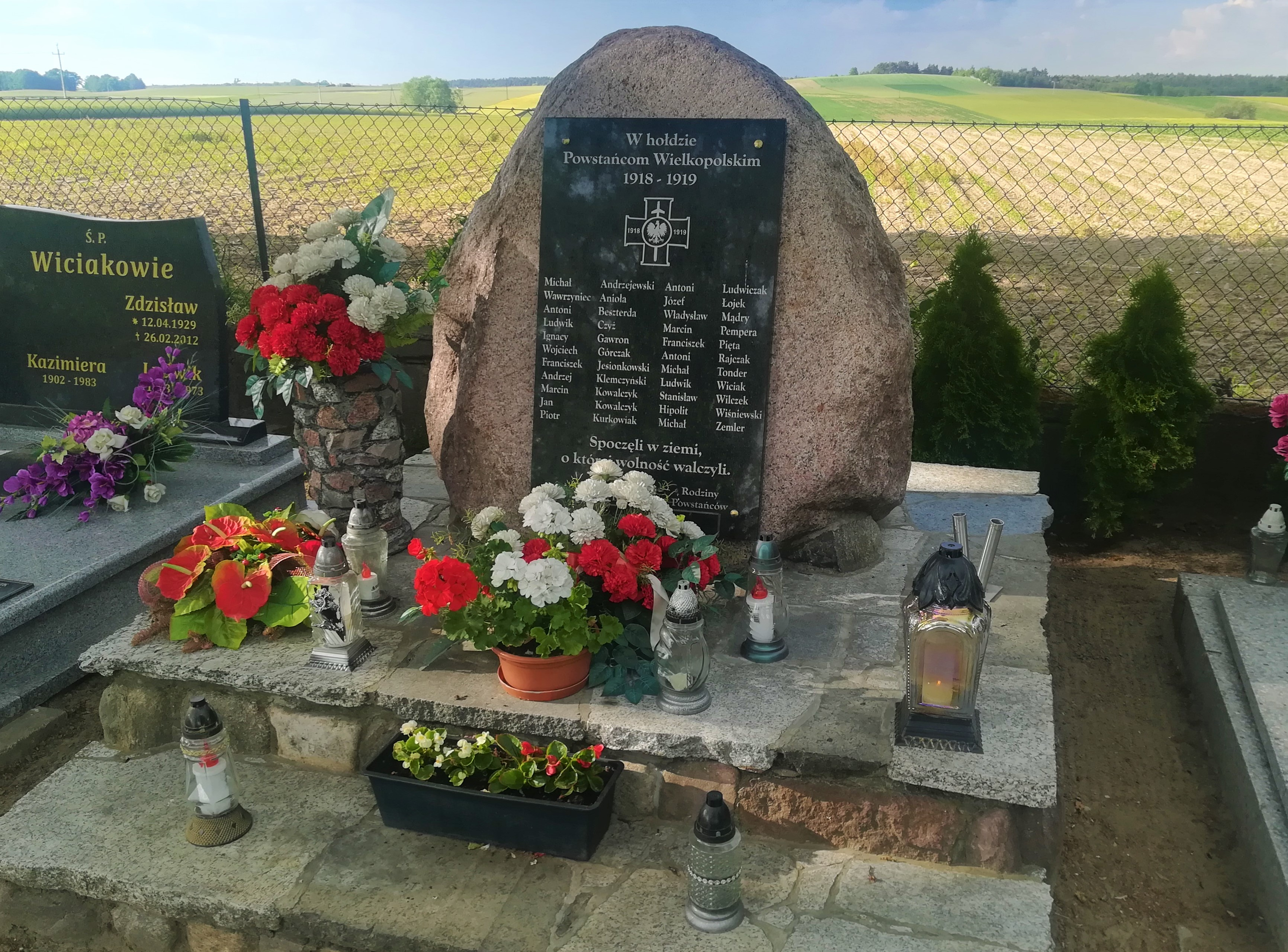 Cmentarz w Tomicach.